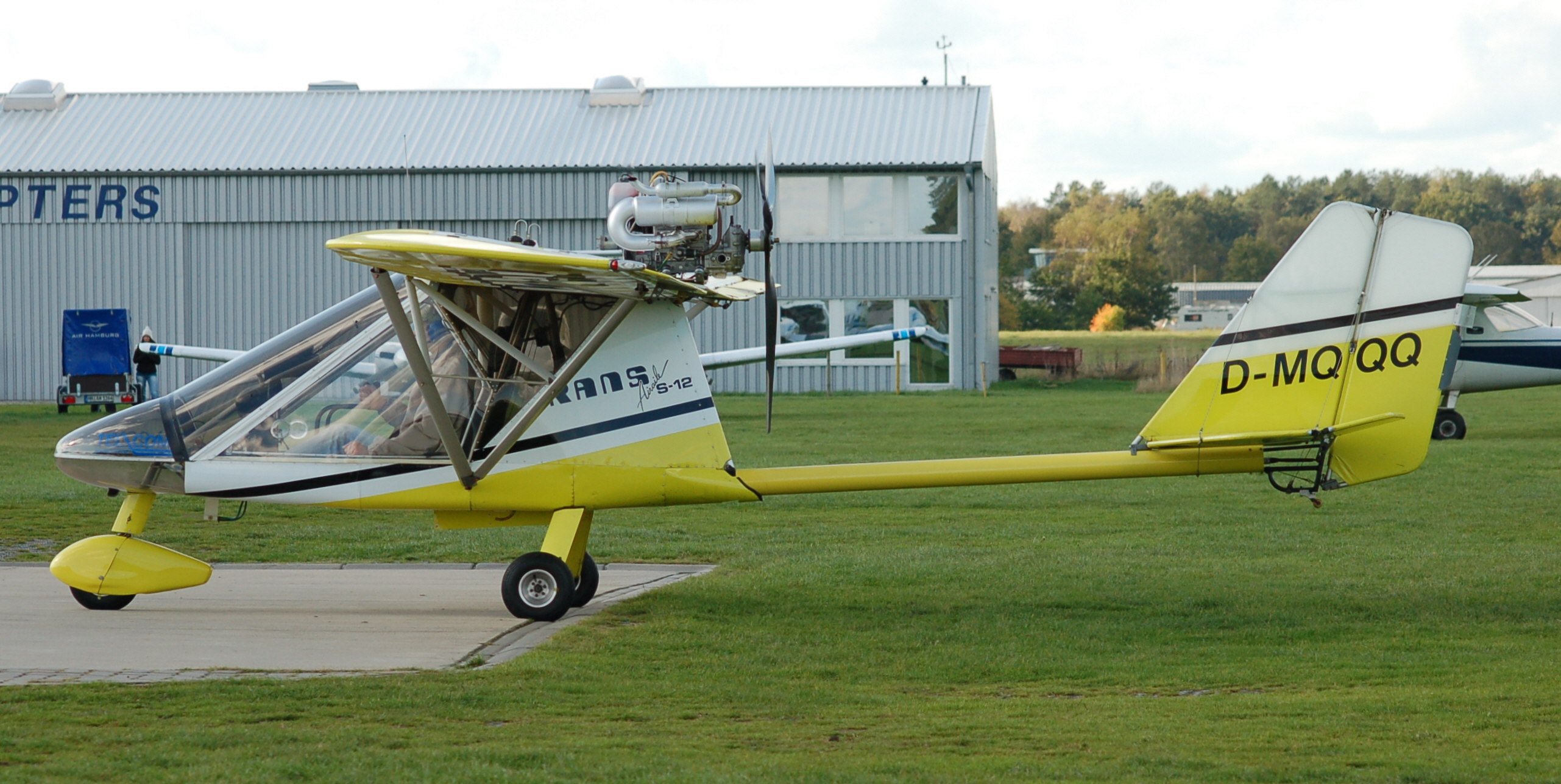 Rans S12 (D-MQQQ) auf dem Flugplatz Uetersen